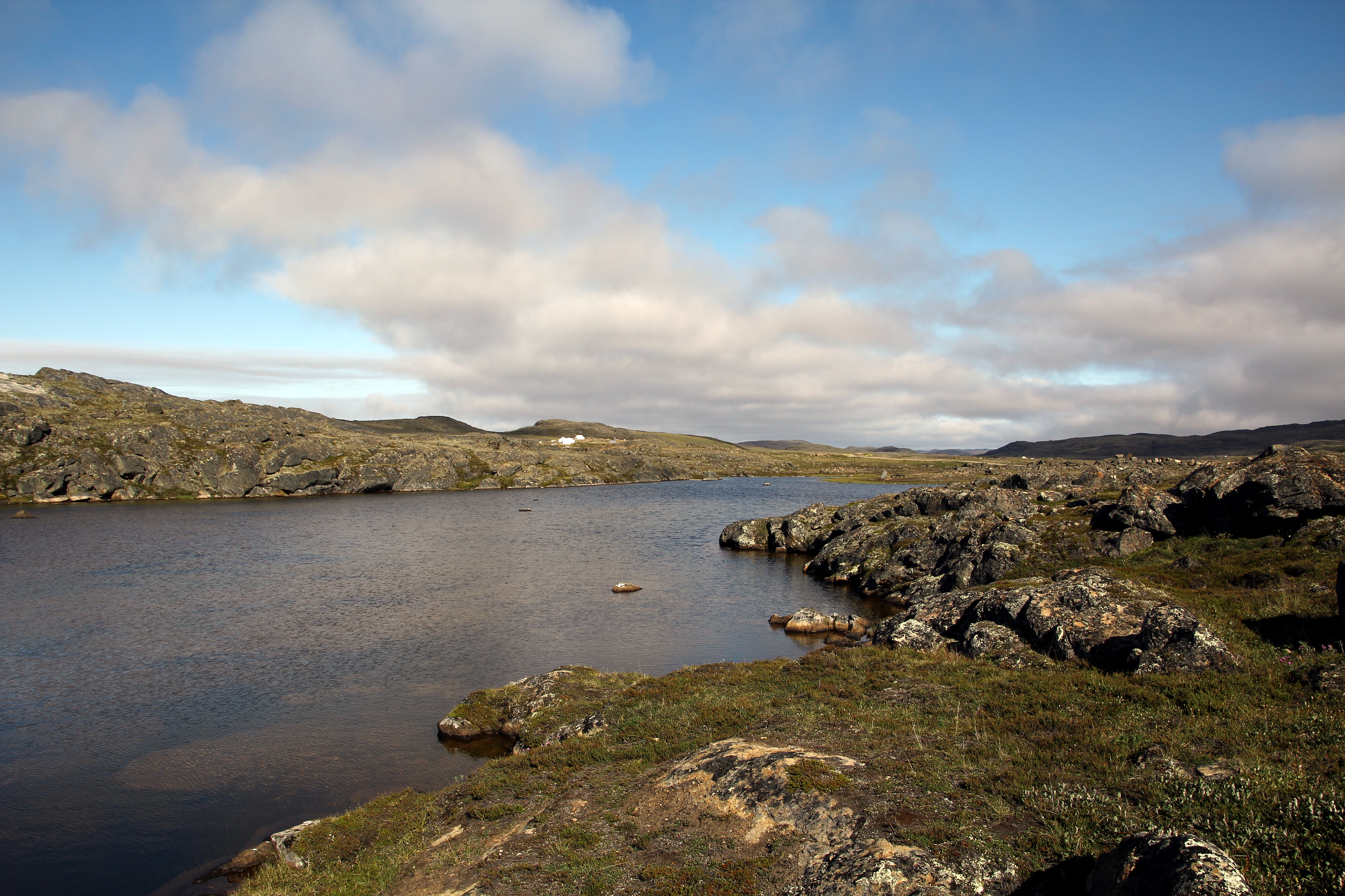 Fluss am Sylvia Grinnell Territorial Park